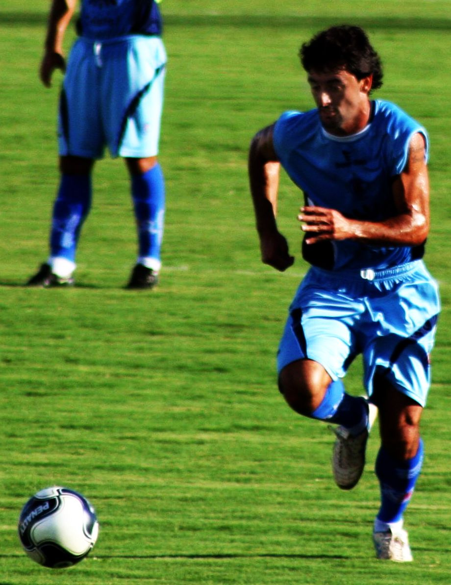 Pachola treinando no Itumbiara.